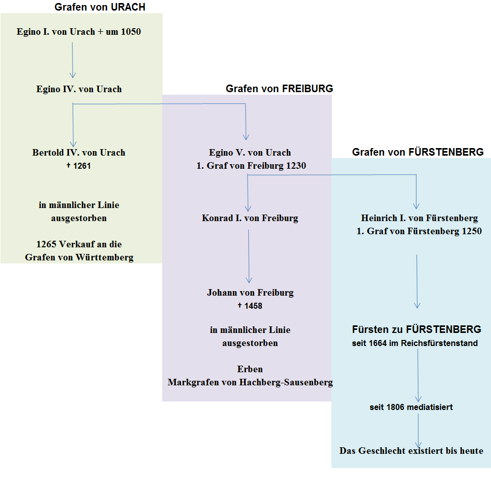 Übersicht über den Zusammenhang der Grafen von Urach, Freiburg und Fürstenberg